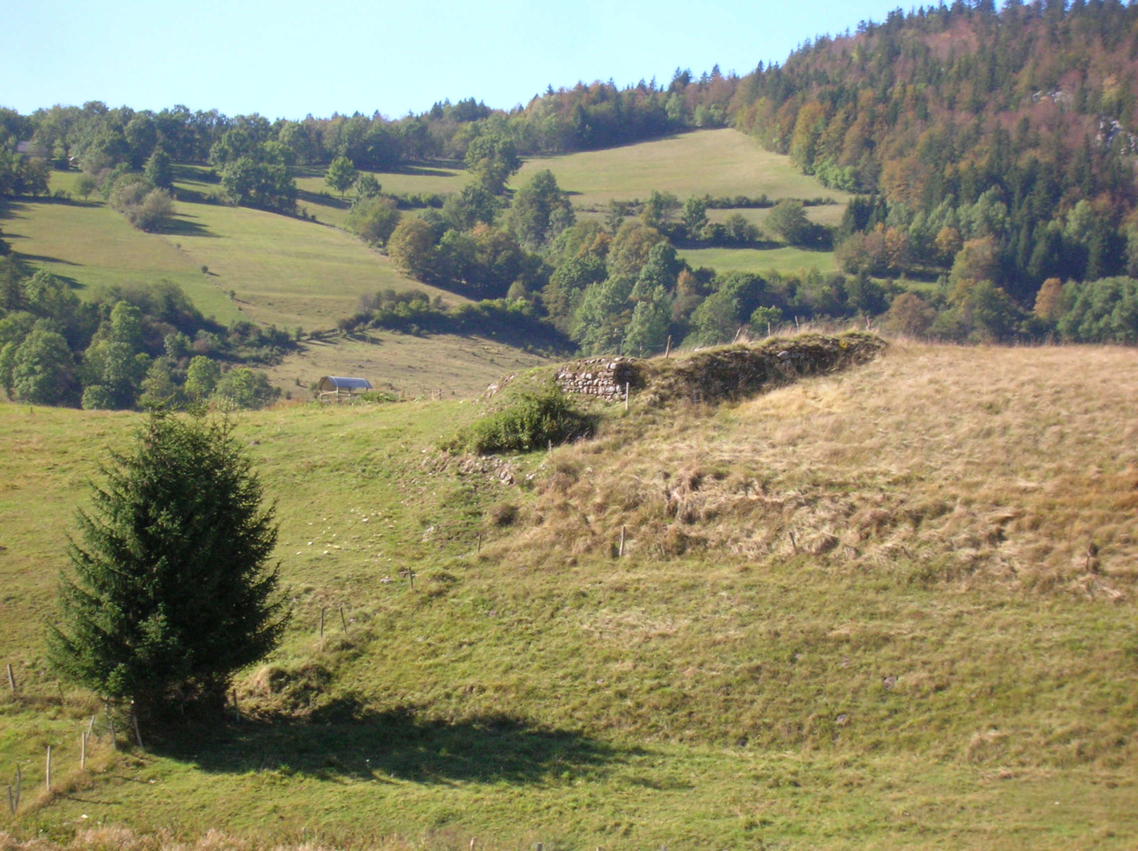 motte et château fort, Corrençon-en-Vercors, Isère, AuRa, France.